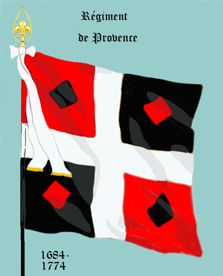 Ordonnanzfahne eines königlich französischen Infanterie-Regiments. - Entnommen und überarbeitet aus: „LES UNIFORMES ET LES DRAPEAUX DE L'ARMÉE DU ROI“ Marseille 1899. (Drapeau d'Ordonnance d' un régiment française d'infanterie royale.)